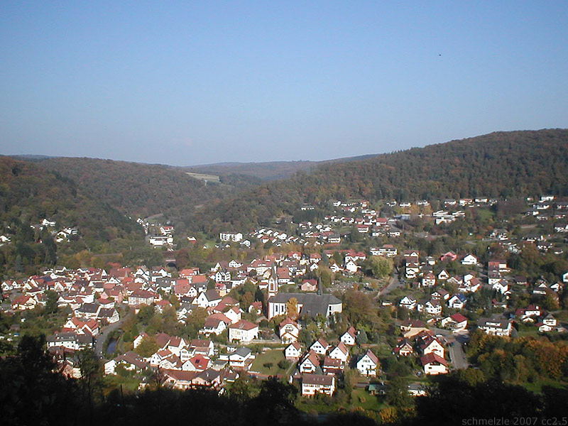 Blick von der Minneburg über Neckargerach, Baden-Württemberg, Deutschland